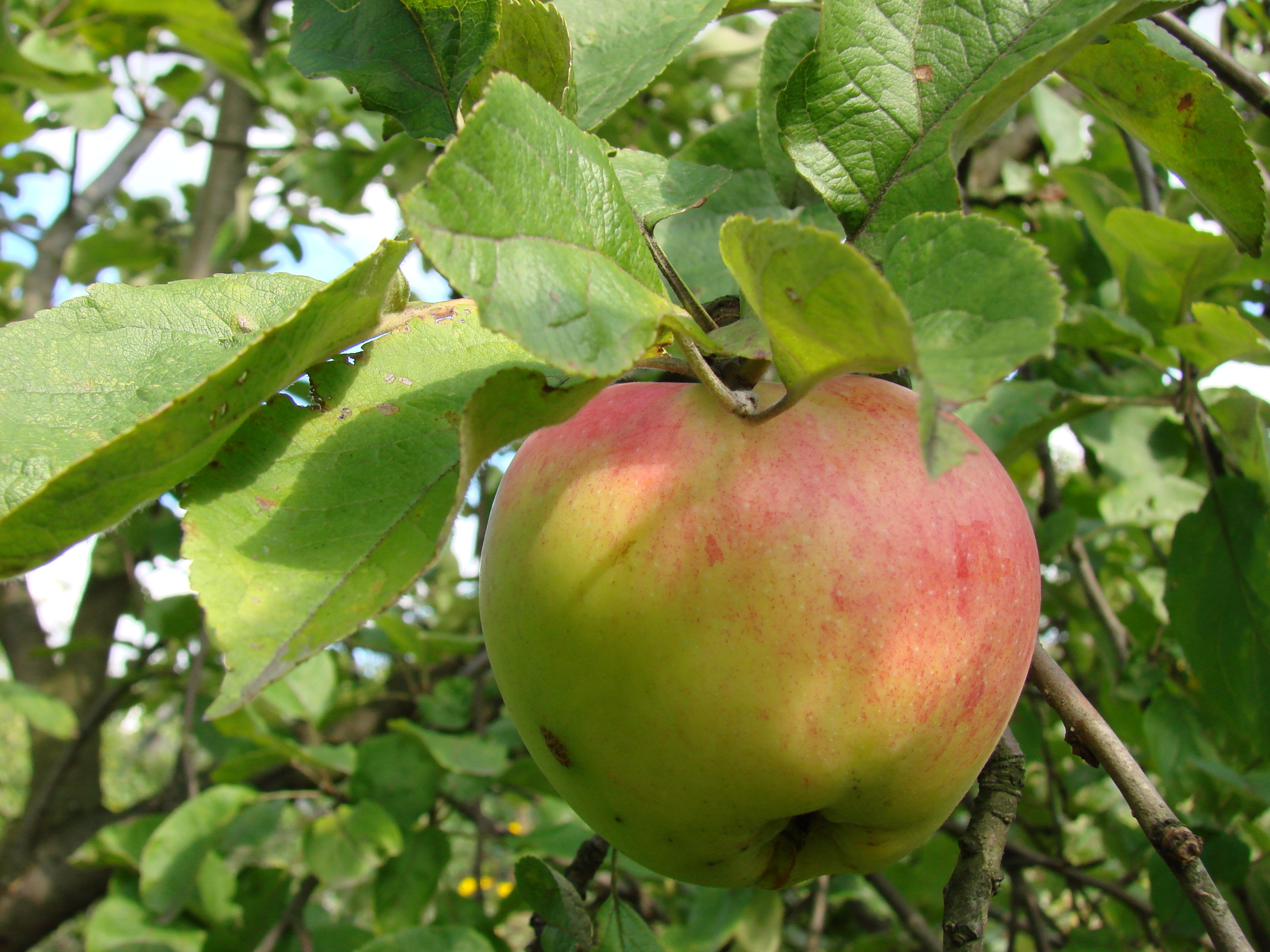 Яблоко на яблоне - Apple